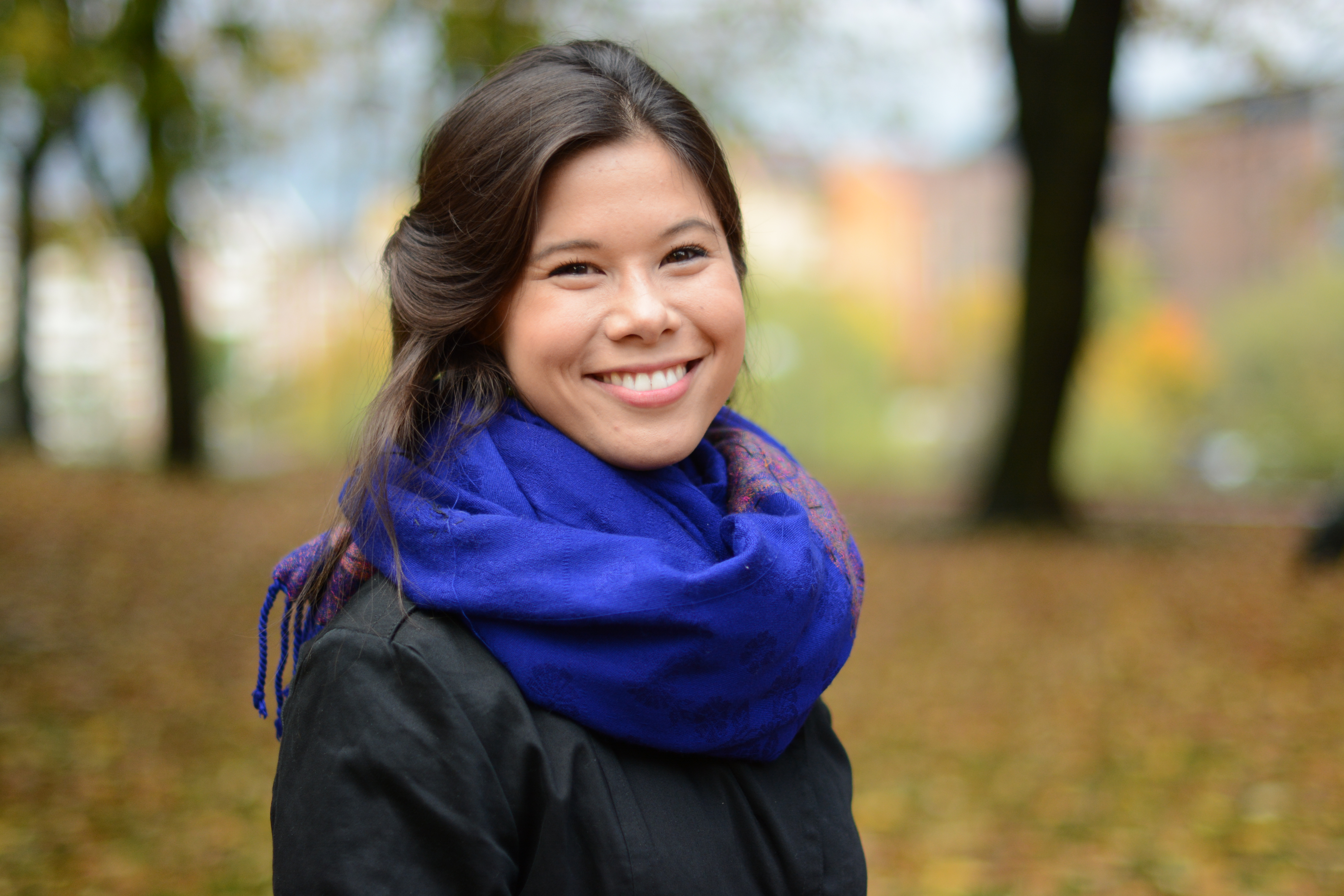 Lan Marie Nguyen Berg - Miljøpartiet De Grønne